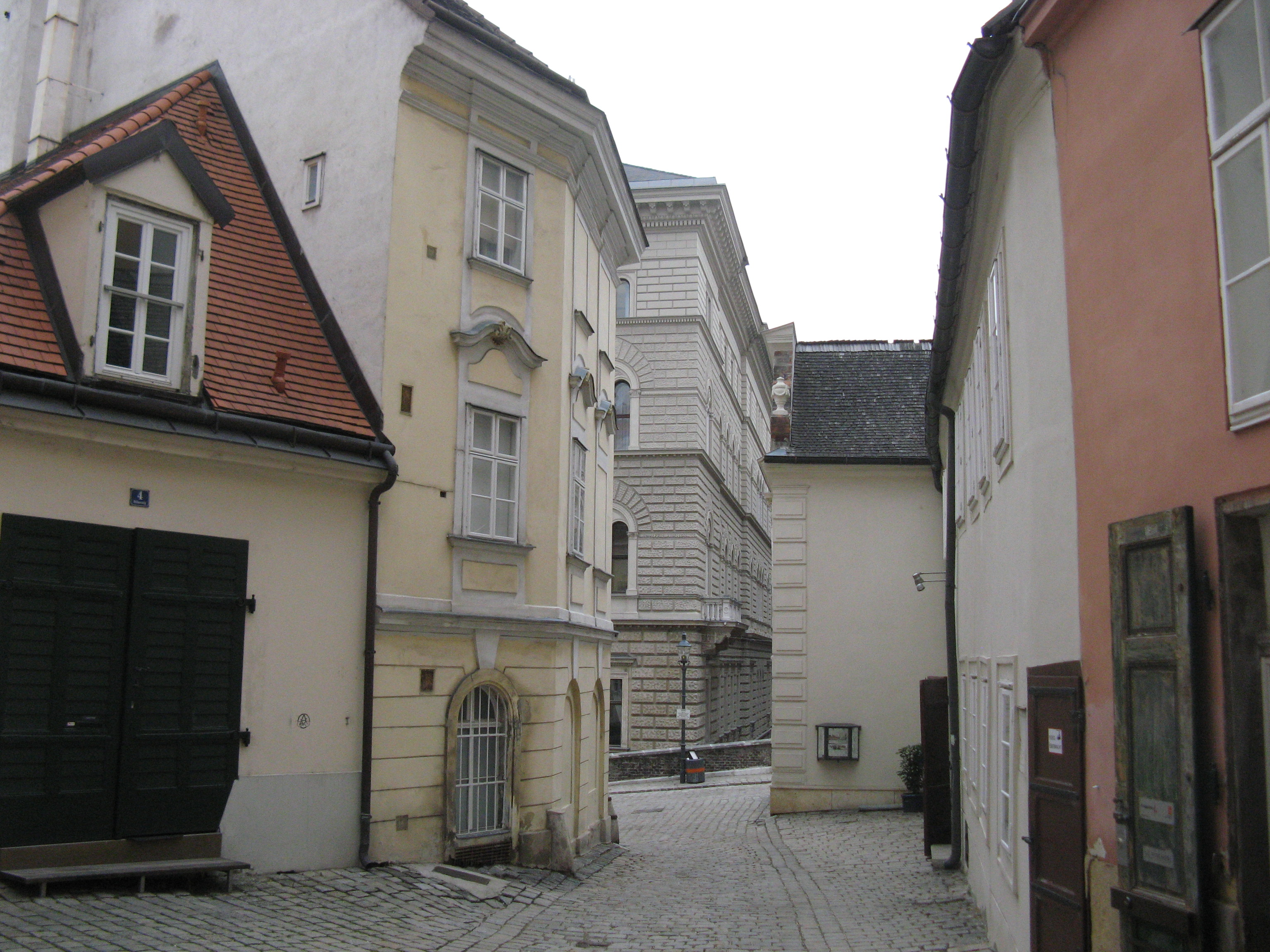 Mölker Steig, Wien-Innere Stadt